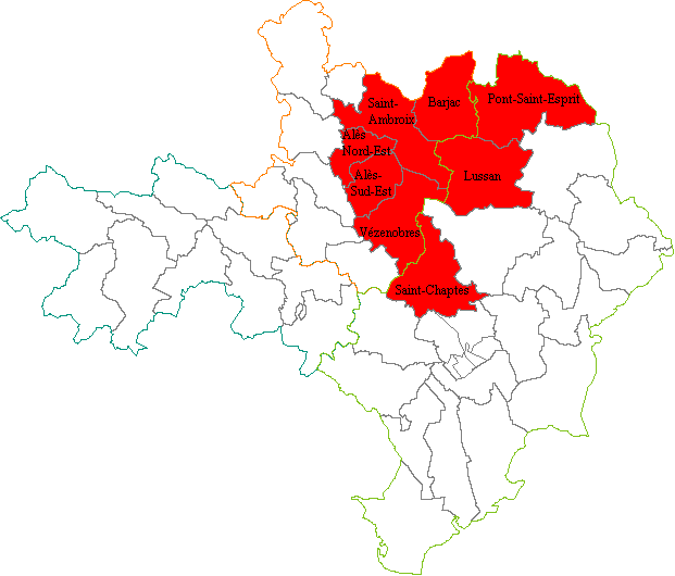 Quatrième circonscription législative du département du Gard